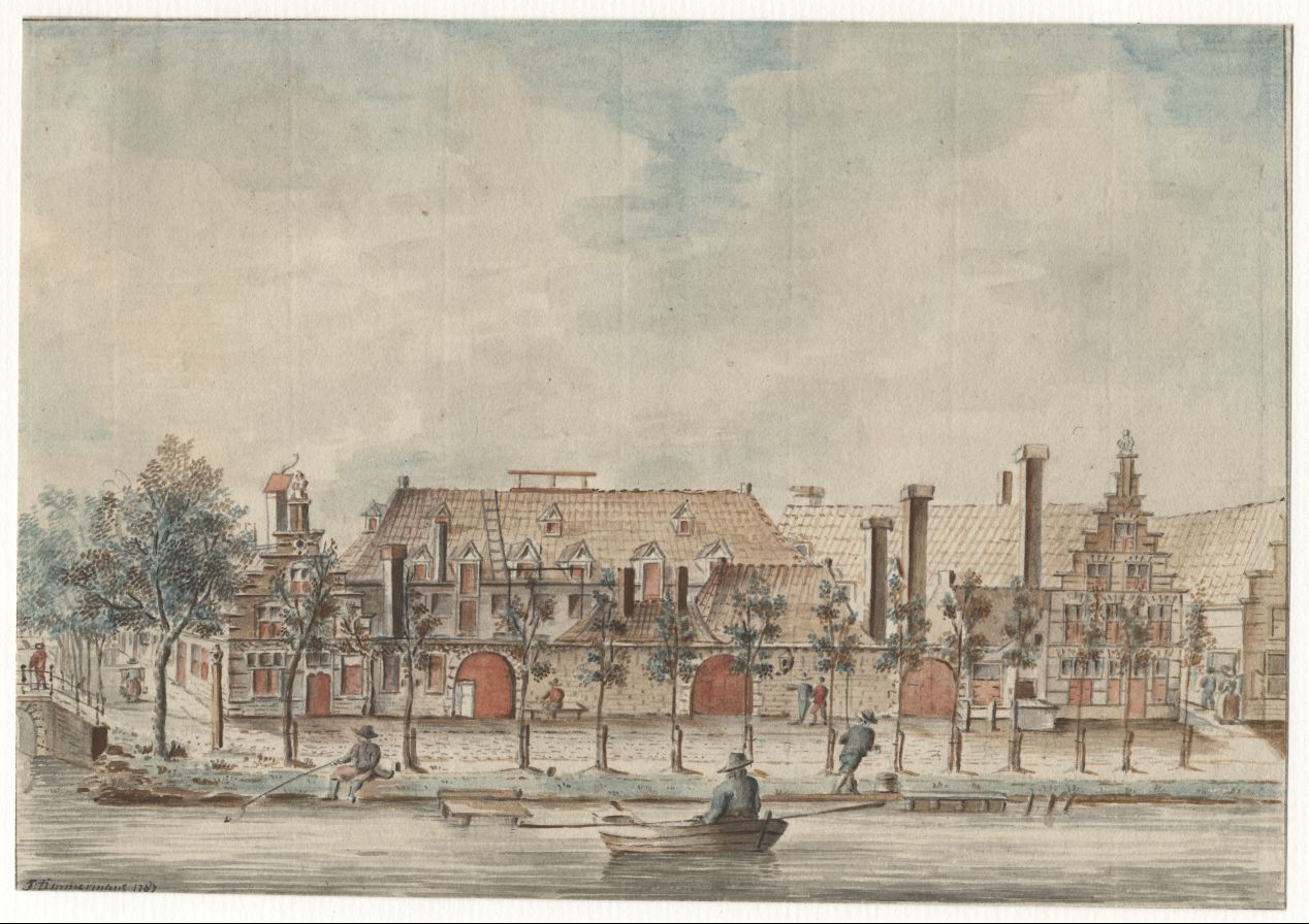 Stadstimmerwerf aan het Kort Galgewater 21-22 tussen de Smidssteeg (rechts) en (links) de (1e) Binnenvestgracht vanaf het Galgewater gezien. Op de voorgrond een roeibootje. Linksonderaan gesigneerd; "J:Timmermans 1787". Jacob Timmermans.